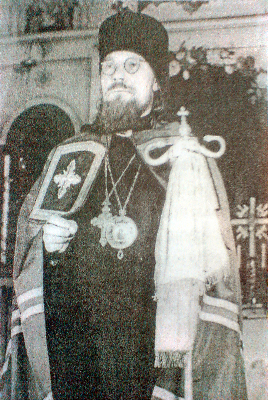 Biskup Atanazy (Martos) jako archimandryta monasteru św. Onufrego w Jabłecznej